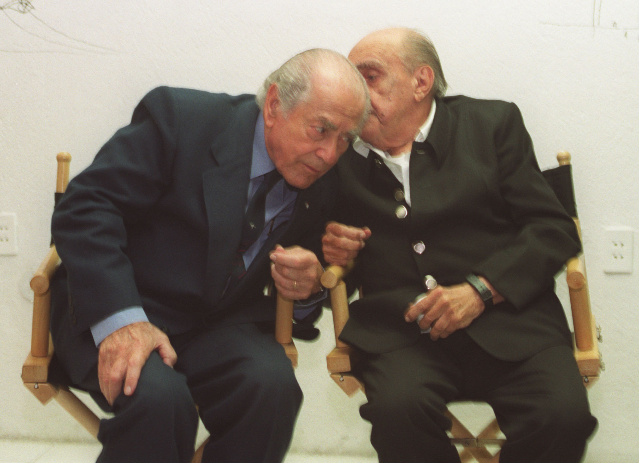 28/08/2002. Encontro de Oscar Niemeyer e Leonel Brizola na casa do arquiteto em Copacabana. Momento memoravel em minha carreira. Foto - Andréa Farias